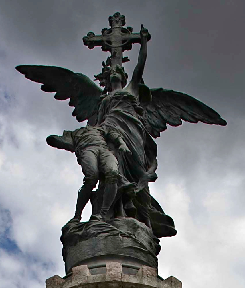 Ángel con baturro caído. Detalle del Monumento a los mártires de la religión y de la patria. Zaragoza (España)